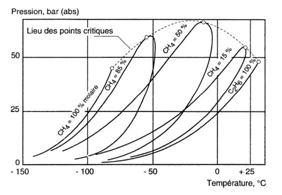 Diagramme de phase des mélanges méthane-éthane. Pression de changement d'état en fonction de la température et de la composition. Trait continu : courbes d'ébullition et de rosée. Tirés : lieu des points critiques.